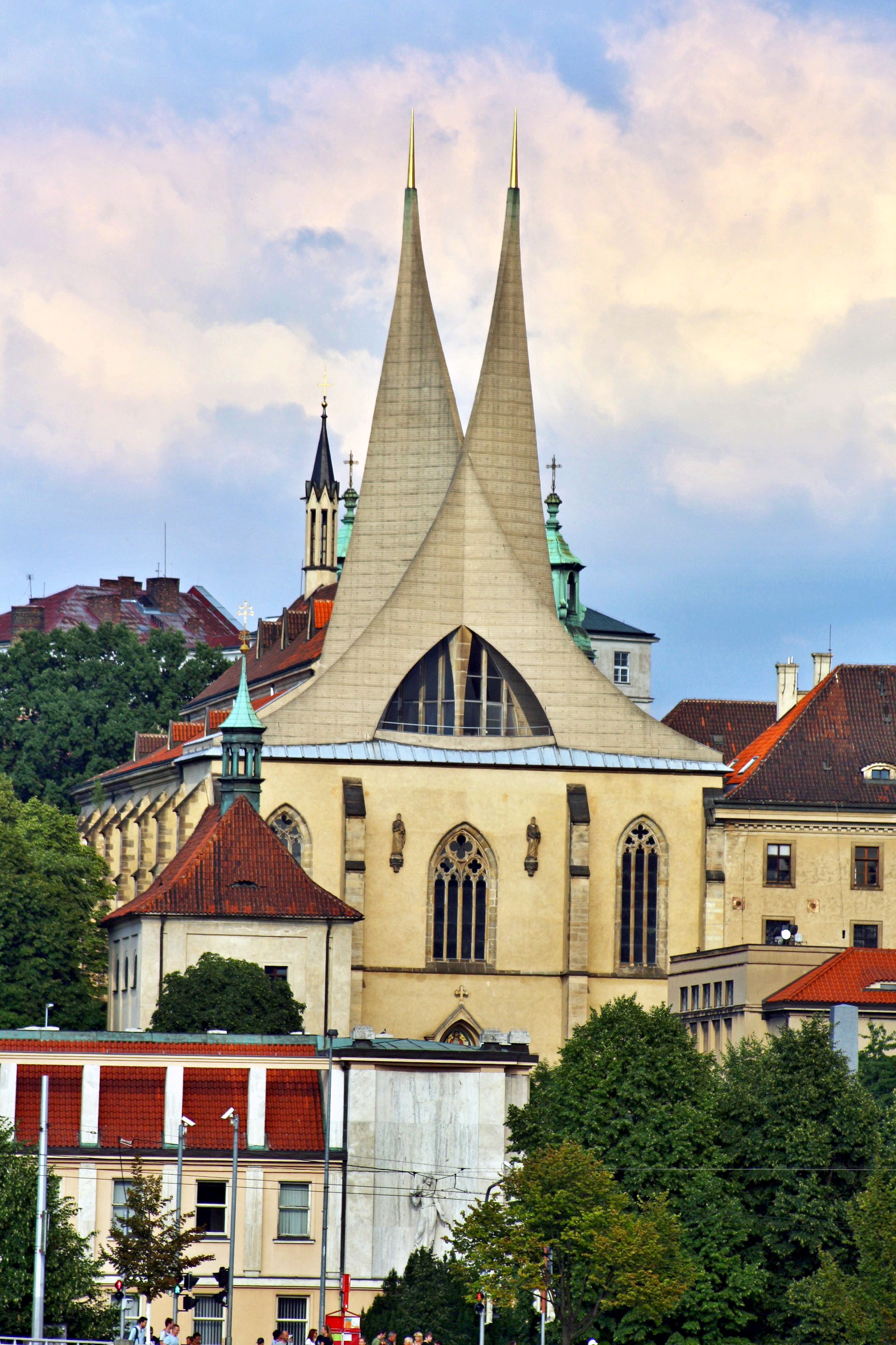 Emauzský klášter